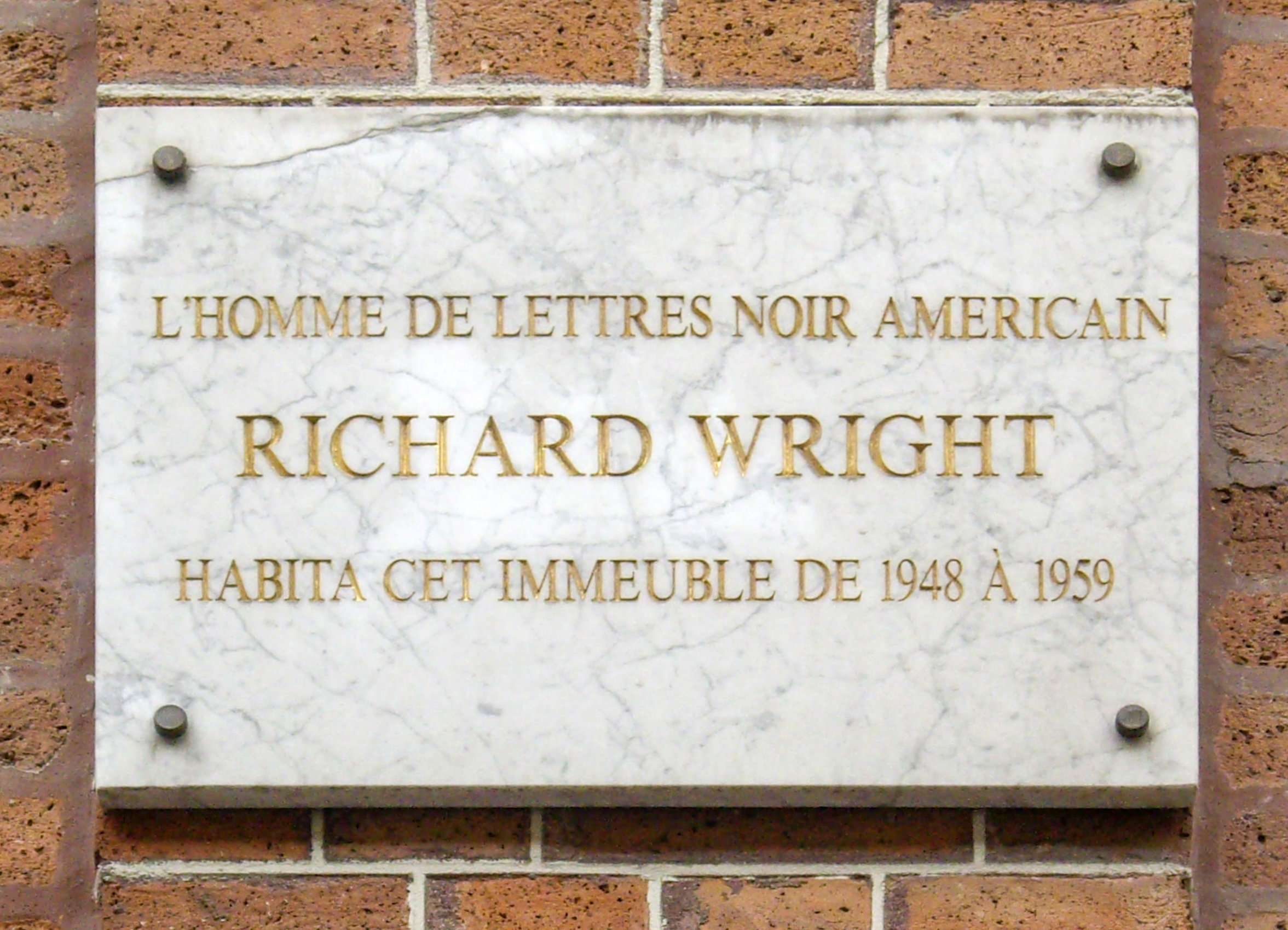 Plaque apposée au n° 14 de la rue Monsieur-le-Prince, Paris 6e, où habita l'écrivain Richard Wright (1908-1960) de 1948 à 1959.